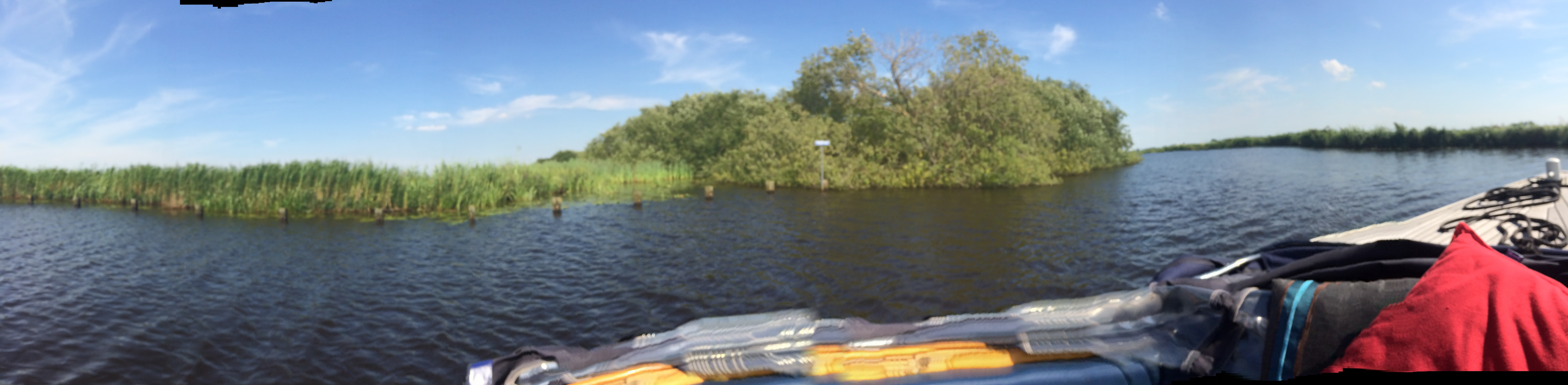 Links de Thomas Pôle